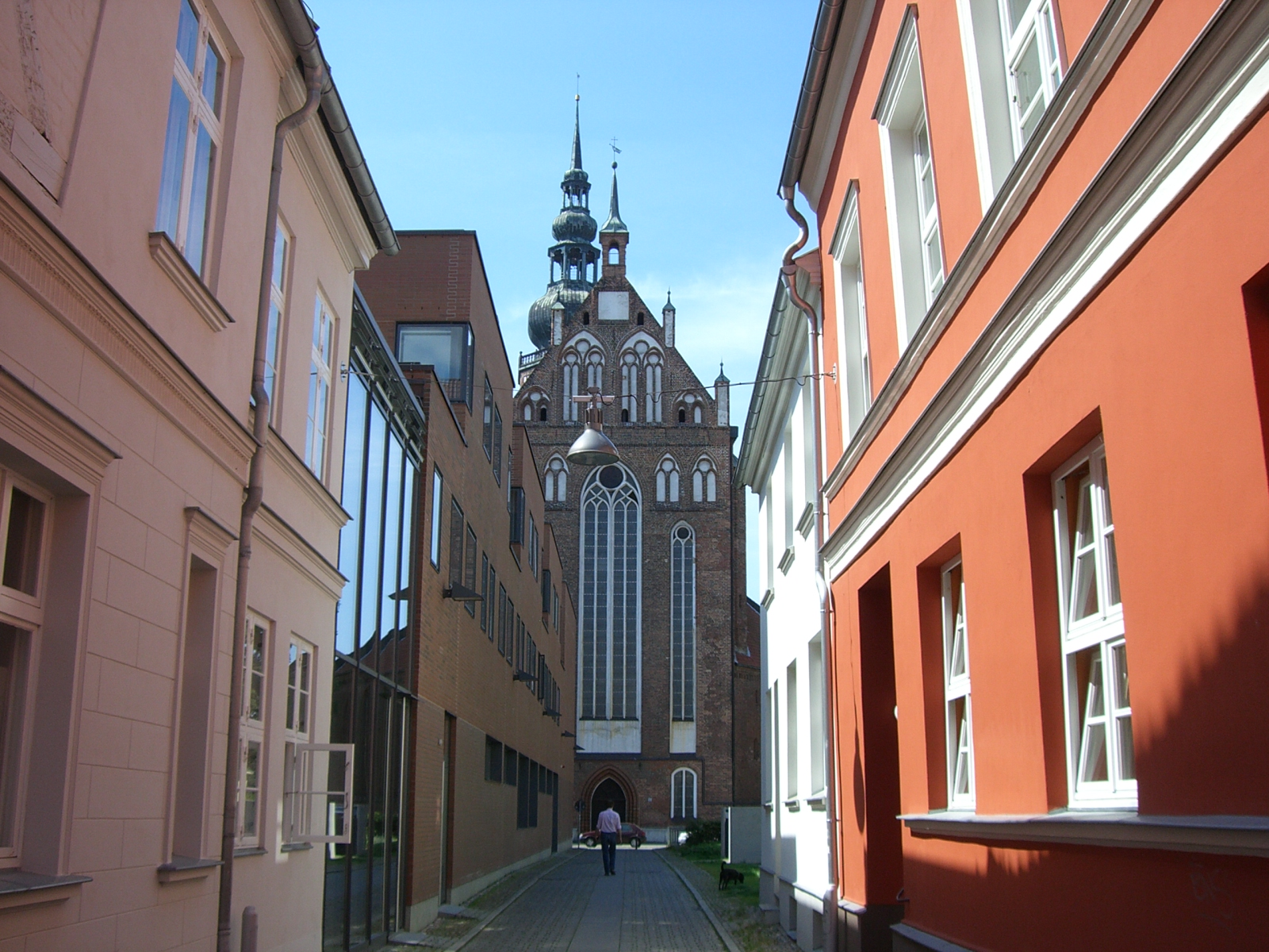 Greifswald